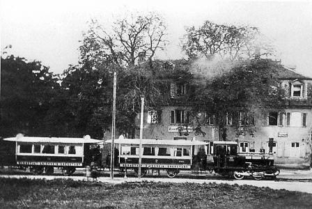 DER FEURIGE ELIAS, um 1890 in der Heidelberger Straße. Foto: Archiv